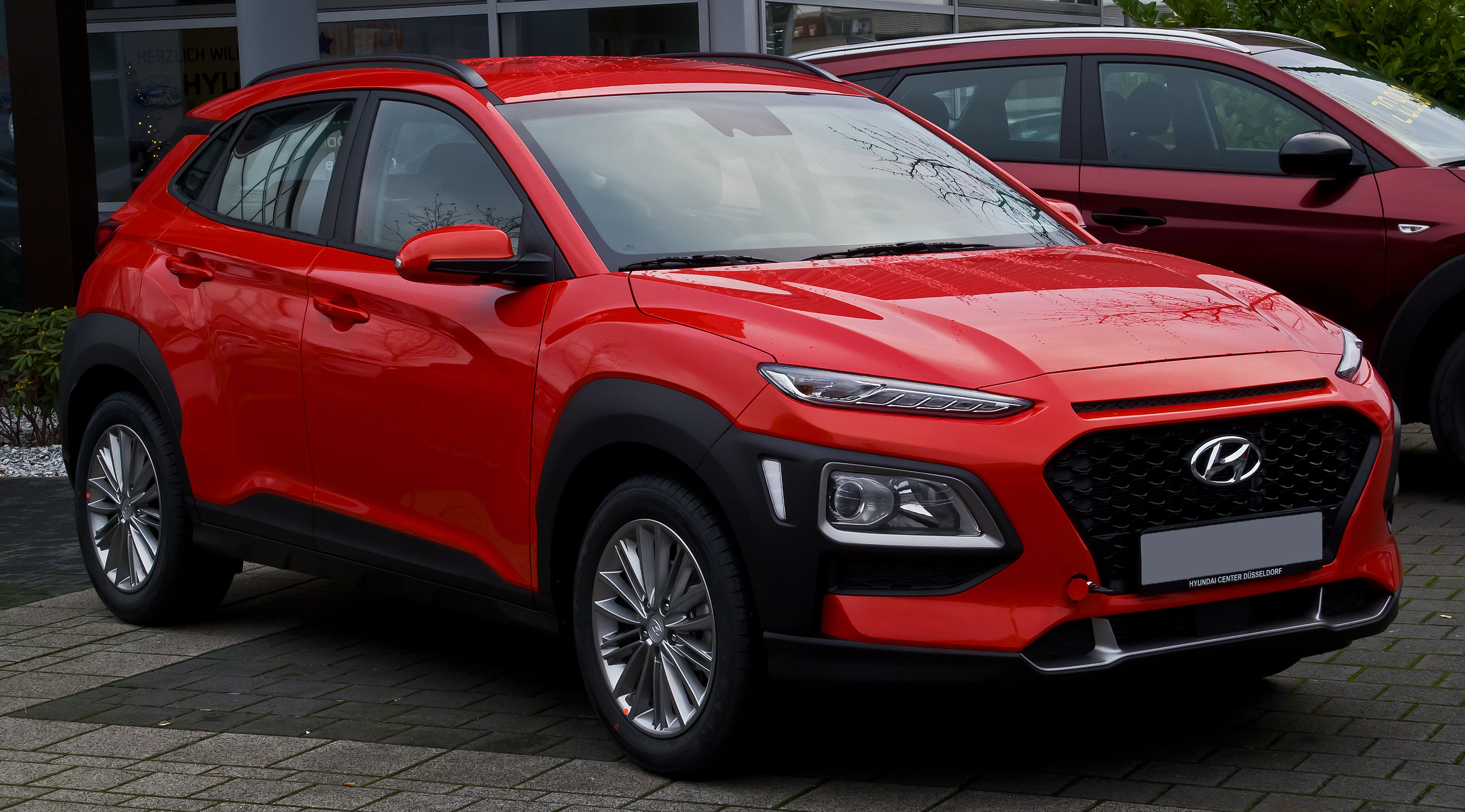 Hyundai Kona 1.0 T-GDI Trend